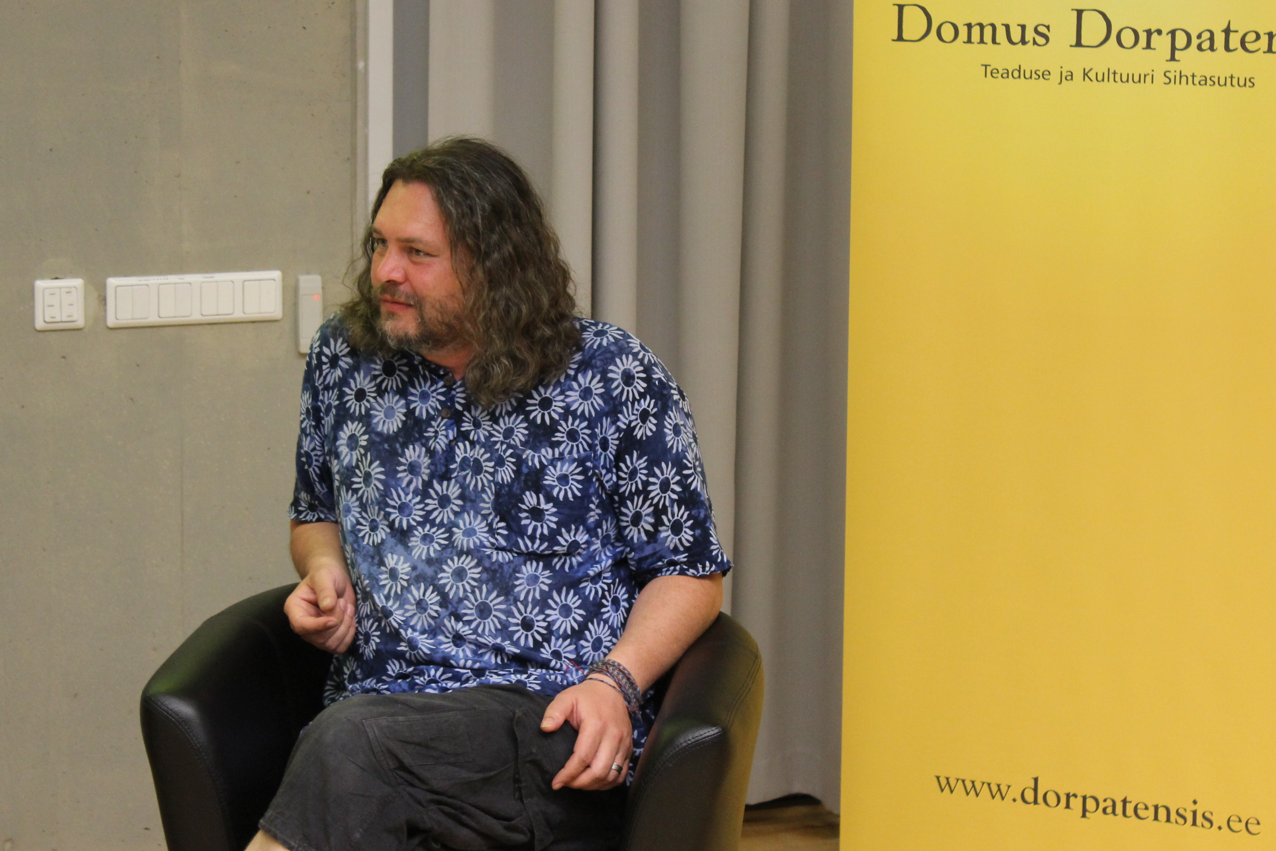 Anzori Barkalaja Mõtlemiskonverentsil AHHAA keskuses.